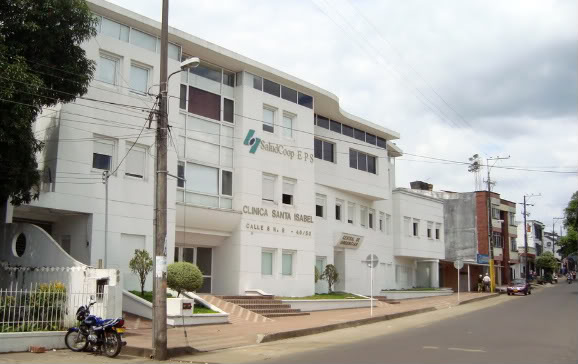 Clínica Saludcoop Santa Isabel en Florencia (Caquetá)